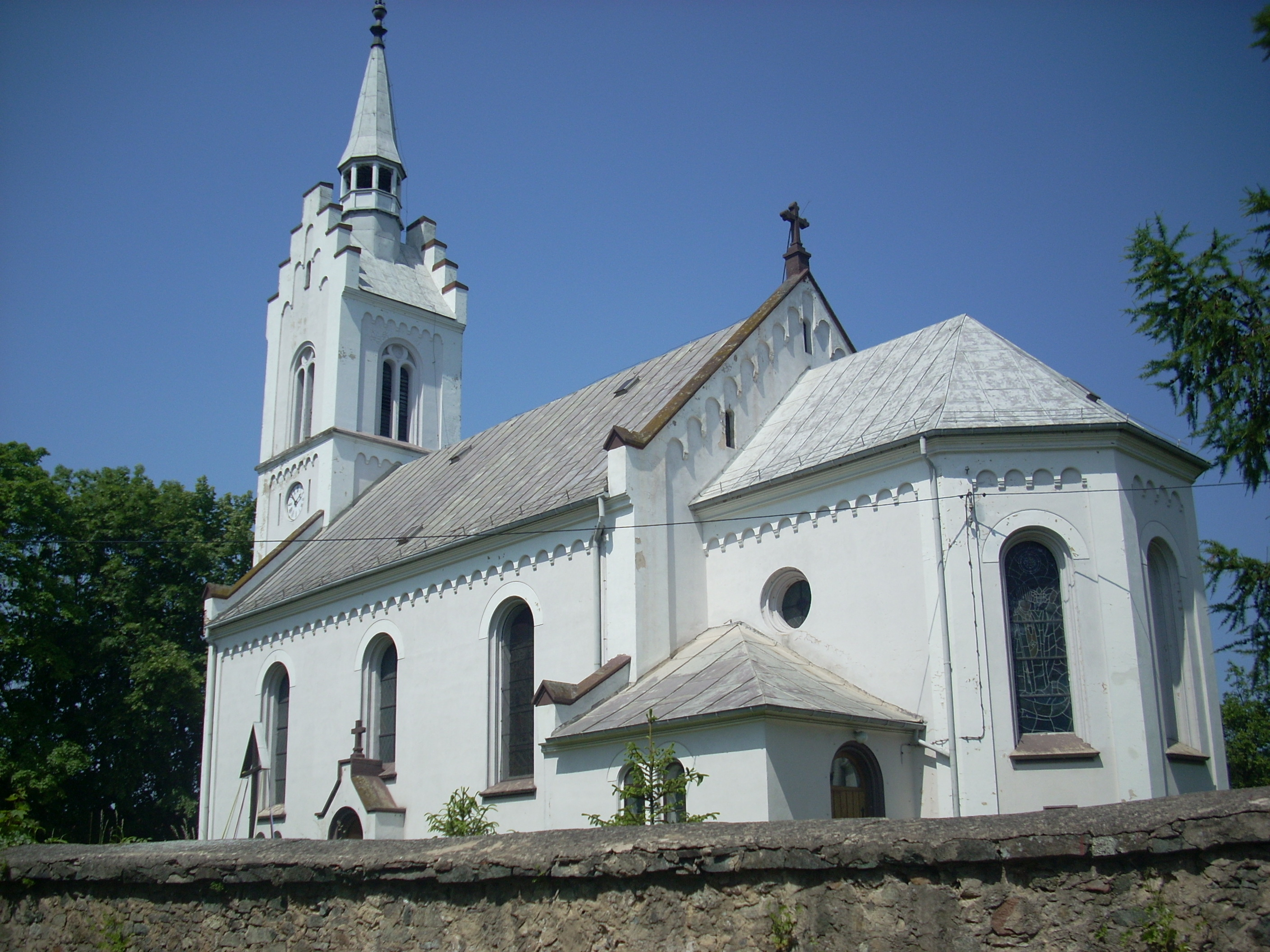 Słupice - kościół parafialny p.w.św. Michała Archanioła